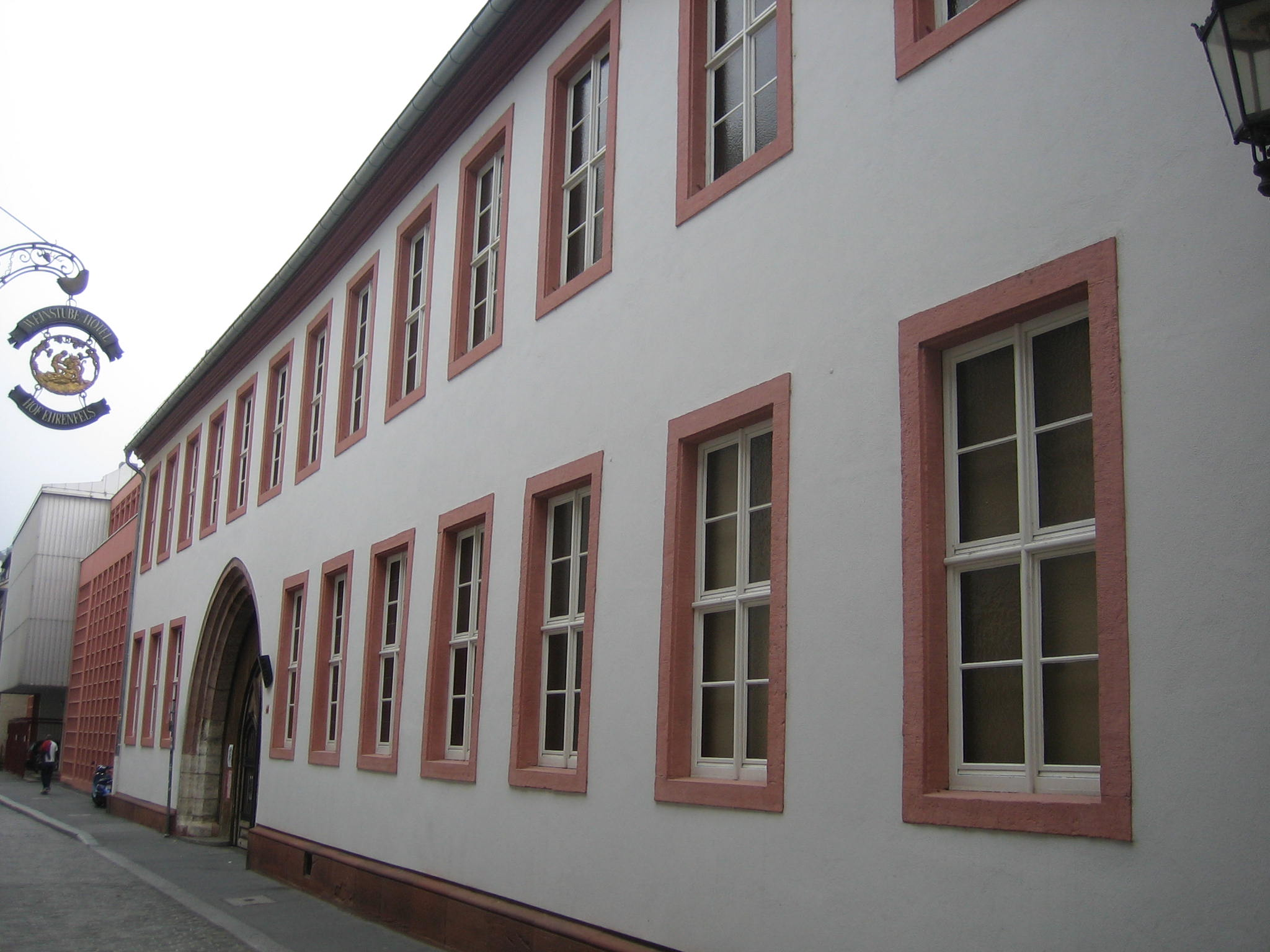 Gebäudekomplex der Martinus-Bibliothek Mainz